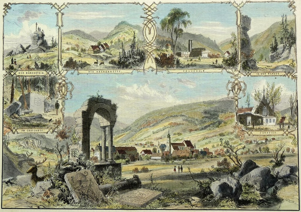 Historische Ortsansicht von Herrenalb. Holzstich, koloriert, 1874., nach Eduard von Kallee. 22 cm x 31,4 cm (Darstellung ) / 24,3 cm x 33,1 cm (Blatt) / 26 x 35 cm (Trägerblatt). Innerhalb der Darstellung Erläuterungen. Unterhalb der Darstellung betitelt sowie "Nach einer Skizze von E. Kallee". - Der Holzstich zeigt im unteren Bereich eine Gesamtansicht von Bad Herrenalb mit Ruinenfragmenten im Vordergrund. Darüber sind weitere Detailansichten abgebildet: Am Grafenweg, Der Bärenstein, Die Aschenhütte, Frauenalb, In der Klause, Paradies. - Blatt auf Trägerpapier aufgezogen.